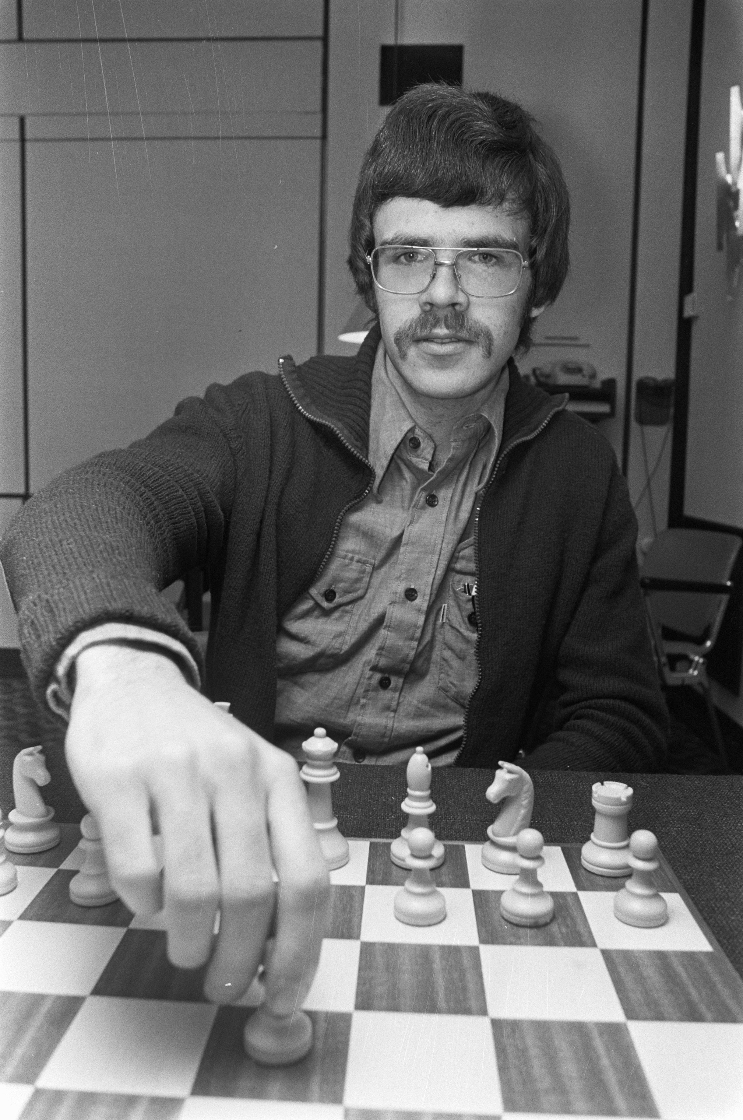 Collectie / Archief : Fotocollectie Anefo Reportage / Serie : De Nederlandse kampioenschappen schaken 1977 Beschrijving : Paul van der Sterren Annotatie : randnummer negatiefstrook: nr. 3 Paul van der Sterren , nr. 4 P. van der Sterren , nr. 5 Cor van Wijgerden Datum : 20 april 1977 Locatie : Friesland, Leeuwarden Trefwoorden : portretten, schaken, sport, wedstrijden Persoonsnaam : Sterren, Paul van der Fotograaf : Fotograaf Onbekend / Anefo Auteursrechthebbende : Nationaal Archief Materiaalsoort : Negatief (zwart/wit) Nummer archiefinventaris : bekijk toegang 2.24.01.05 Bestanddeelnummer : 929-1328